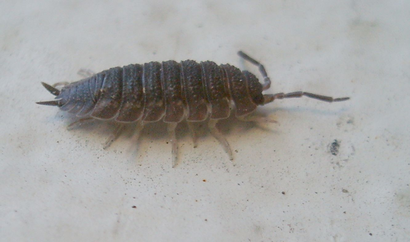 Kellerassel